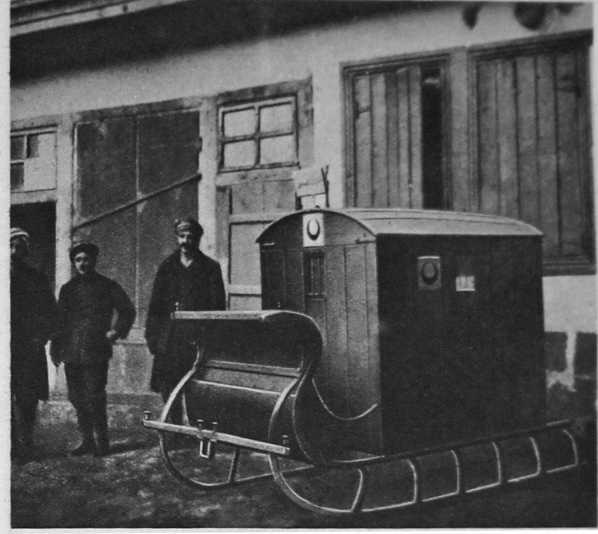 Le Miroir numéro_129, page_15_vue d'une ambulance_du_Croissant_rouge capturée par les troupes russes.